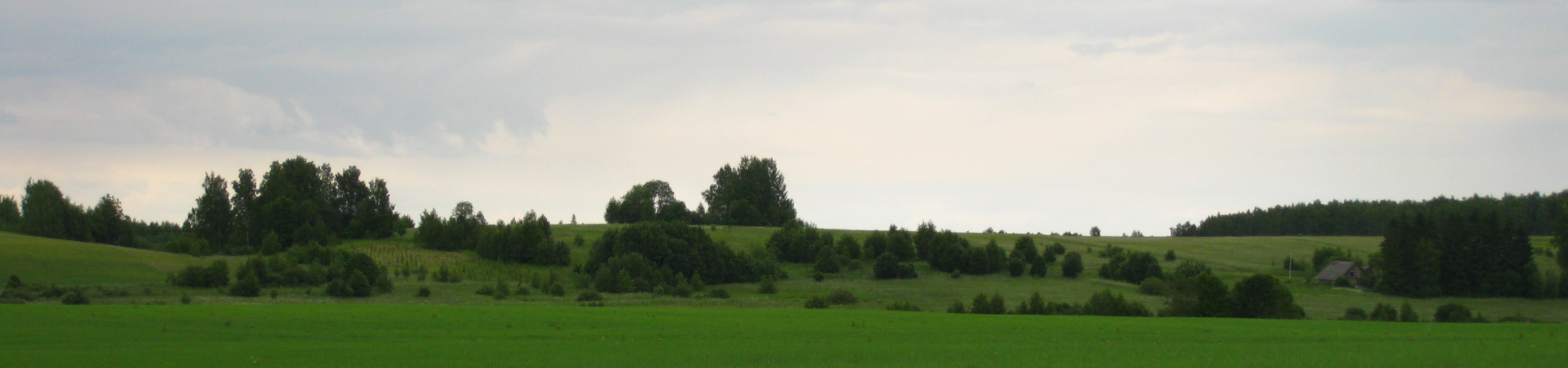 Vooremaa Elistvere järvest umbes pool kilomeetrit lõunas Juula külas